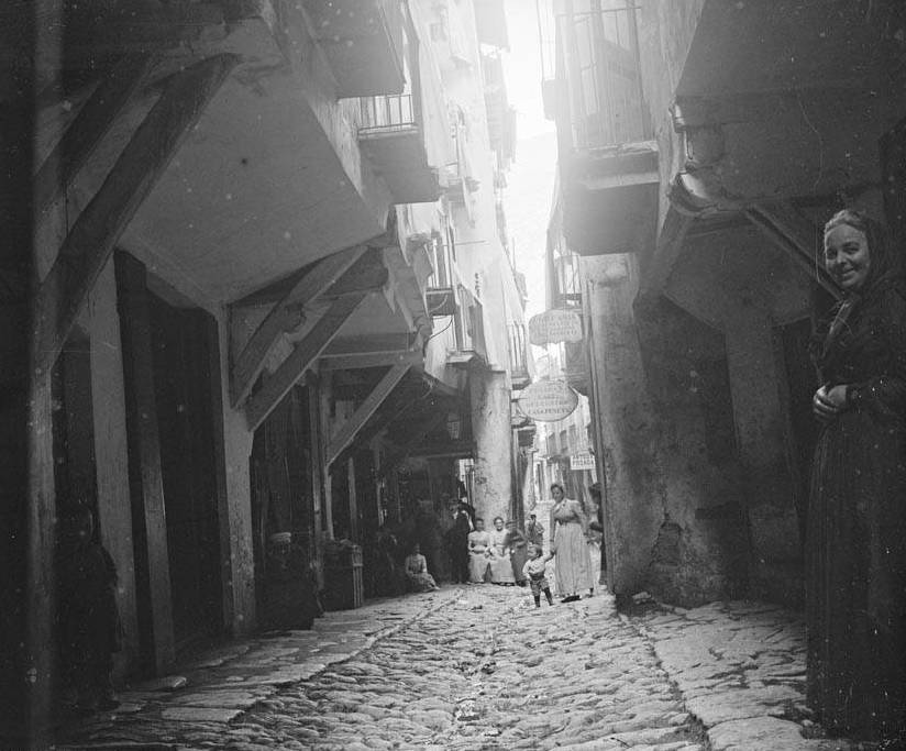 Imatge